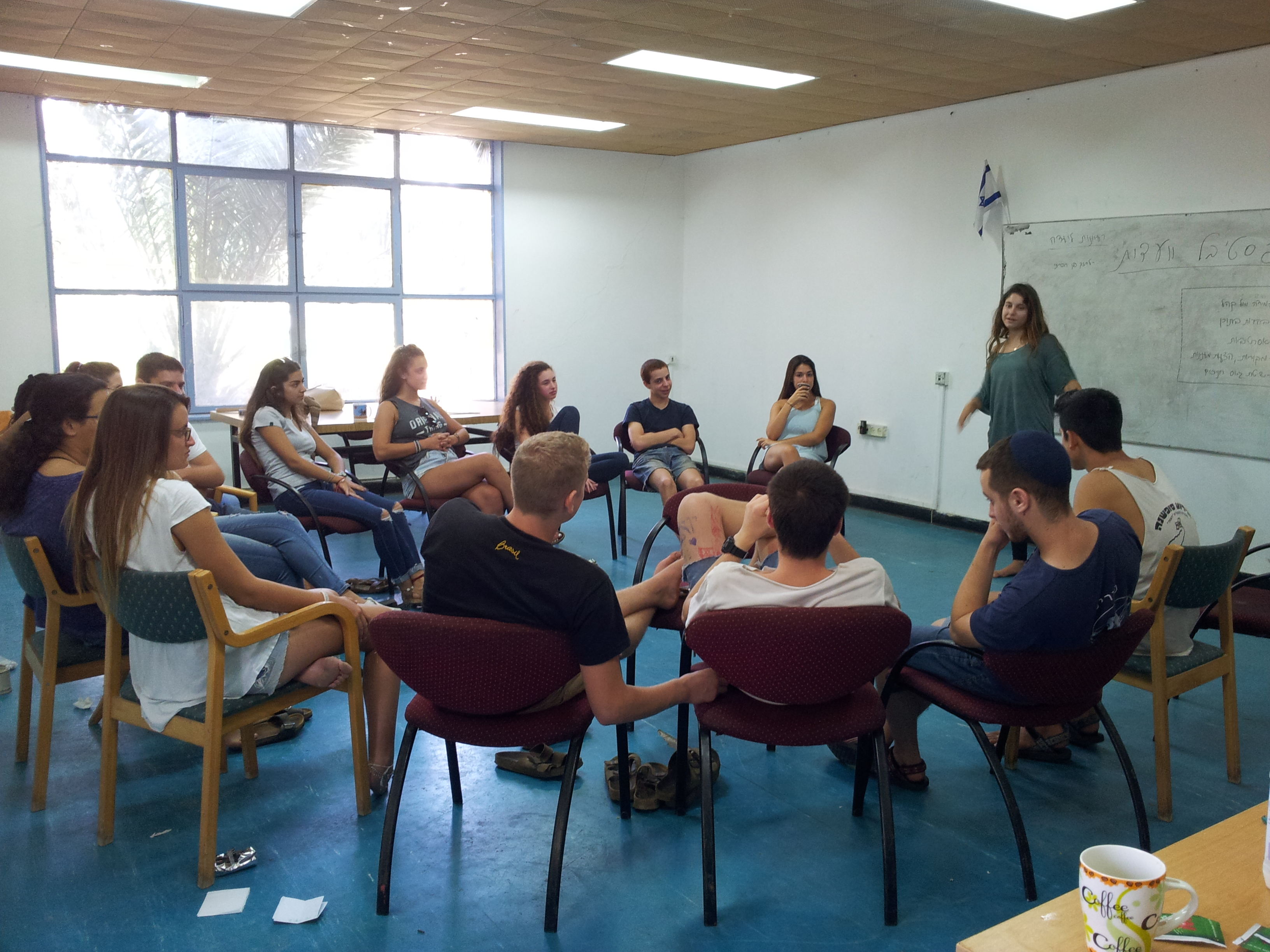 ישיבה של פורום רכזים